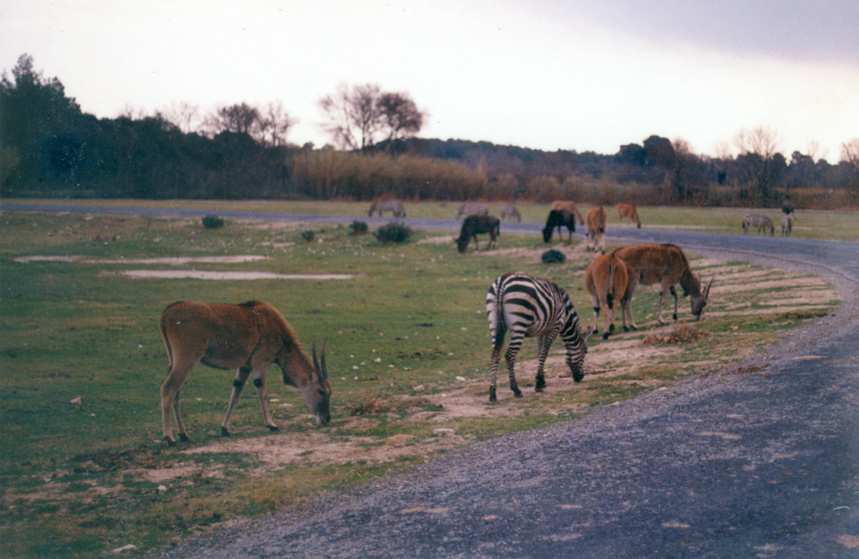 Divers animaux, dans la Réserve africaine de Sigean